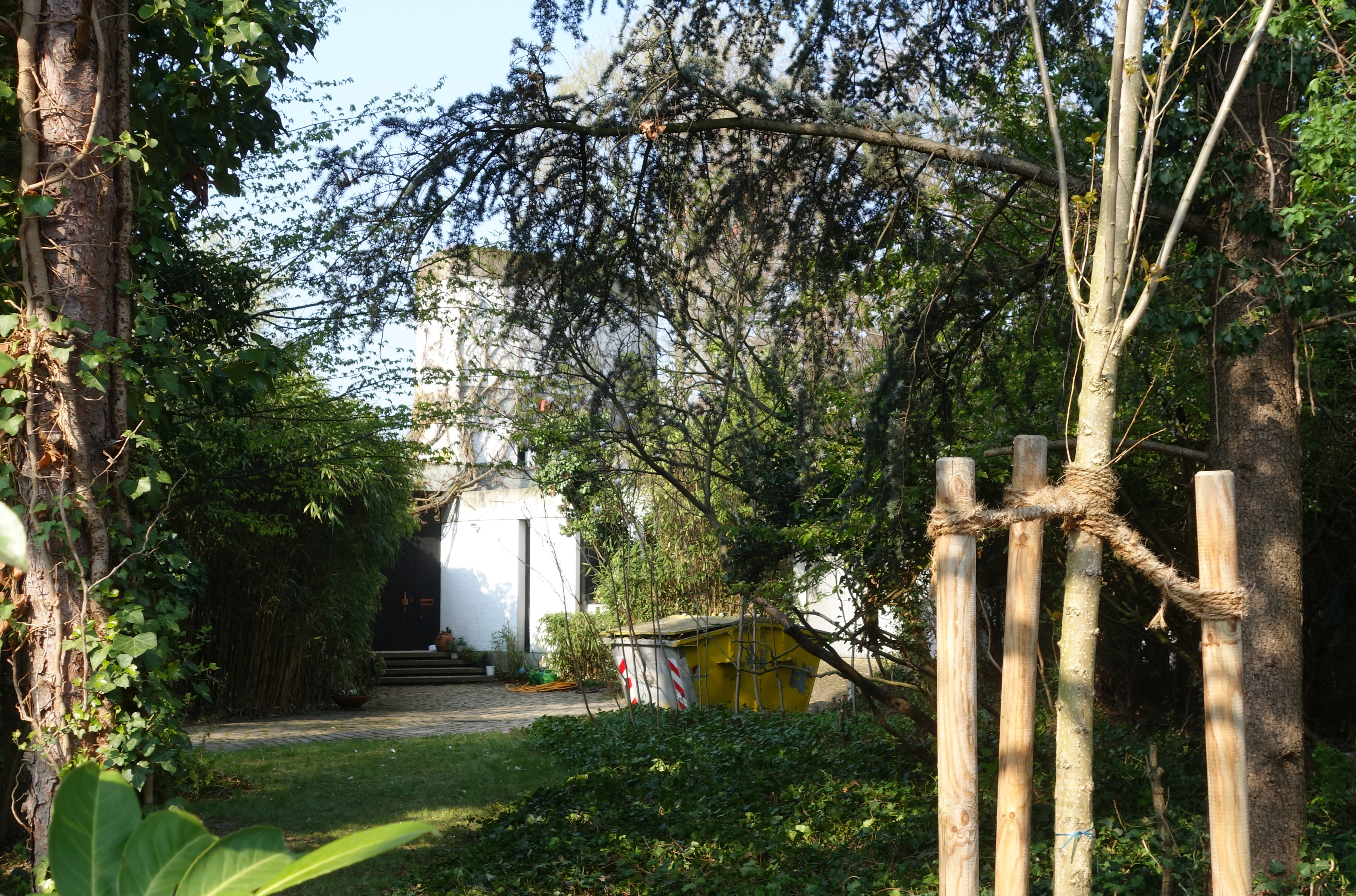 Haus Zindler, Himmelgeister Landstraße 171-173, Düsseldorf, 2019.